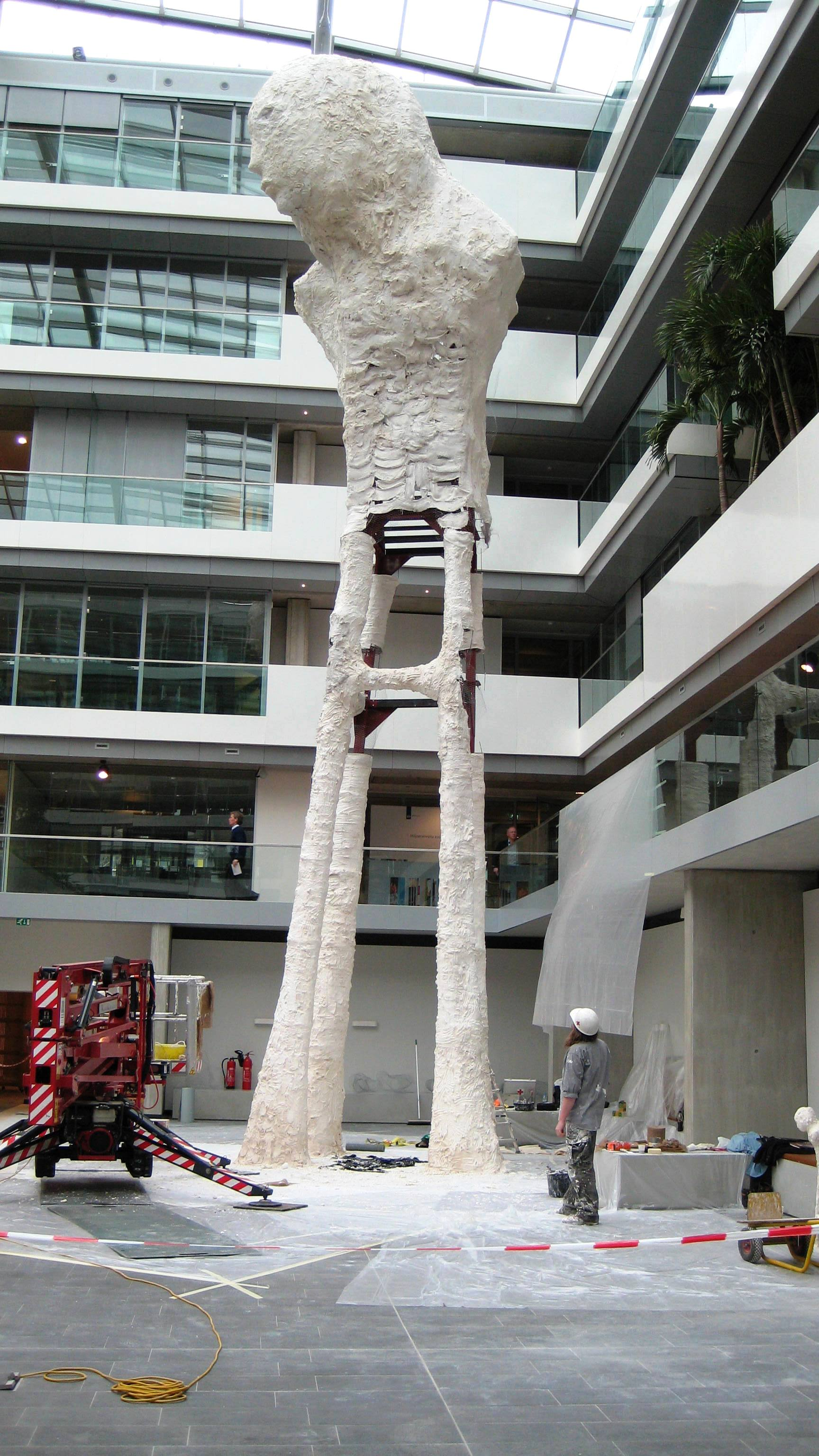 construction phase of 14 meter high sculpture of Johan Tahon in Dutch Ministry of Finance